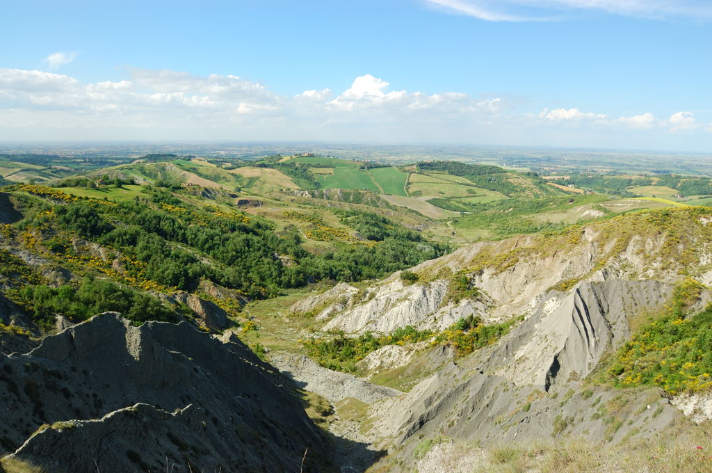 Autore: Tiziano Rossano Mainieri Soggetto: Valle del Sillaro, vista con calanchi sulla Pianura Padana Immagine tratta da questa pagina